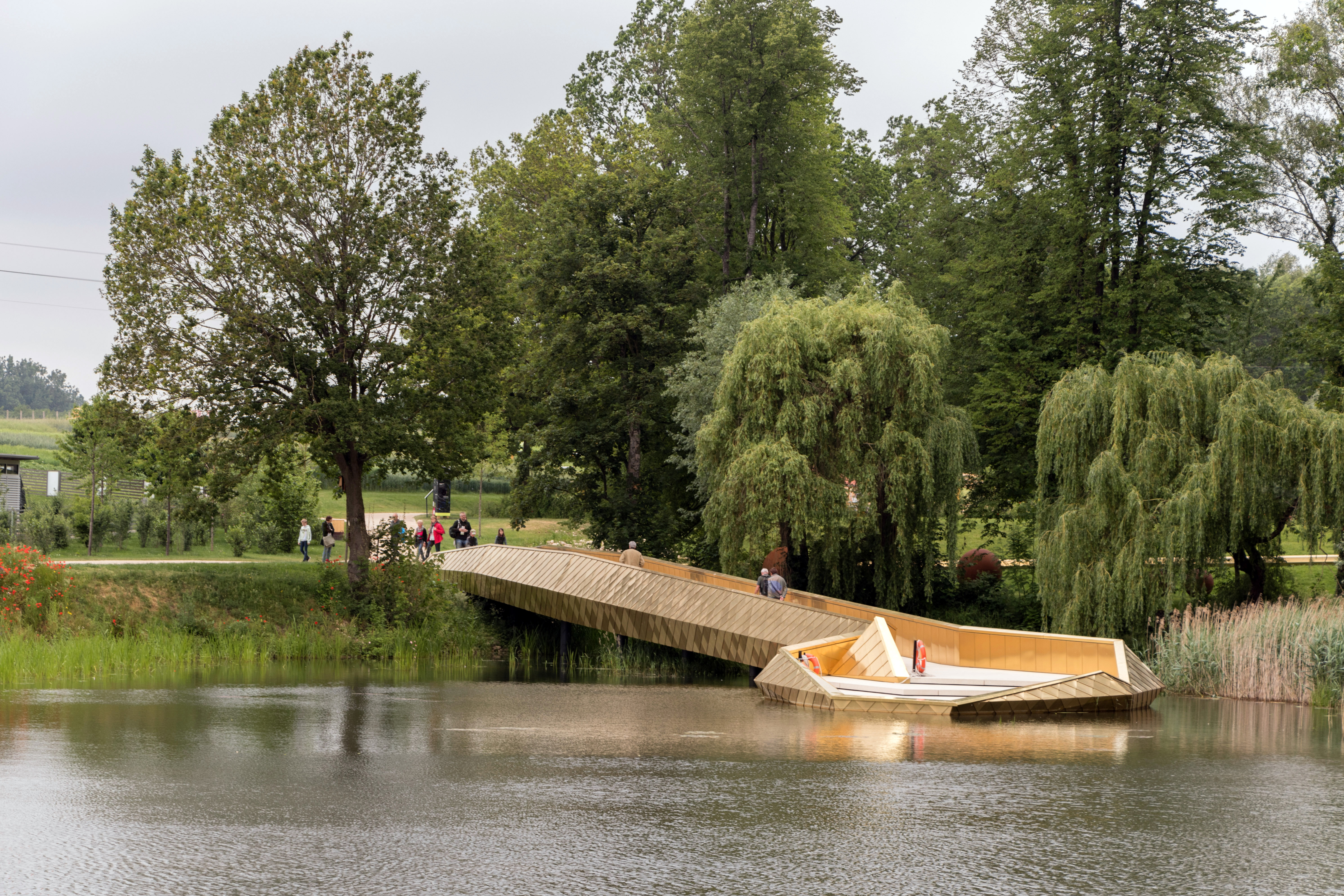 Kleine Landesgartenschau, 2019, Wassertrüdingen